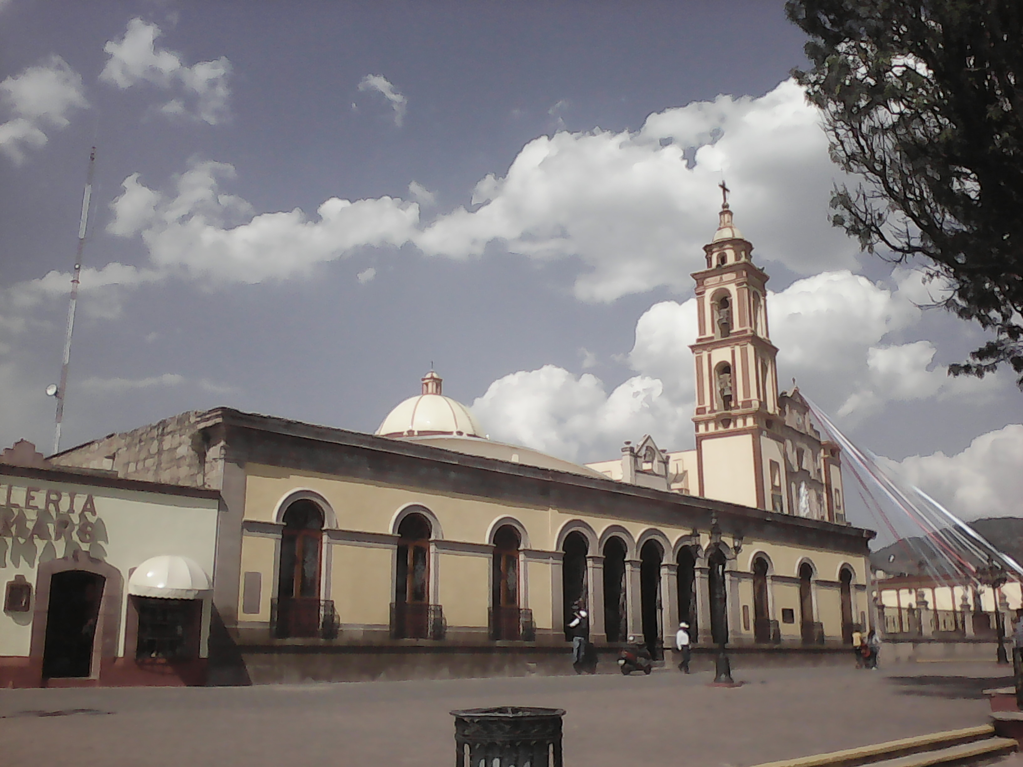 Palacio de Gobierno e Iglesia en Tlaxco, Tlaxcala